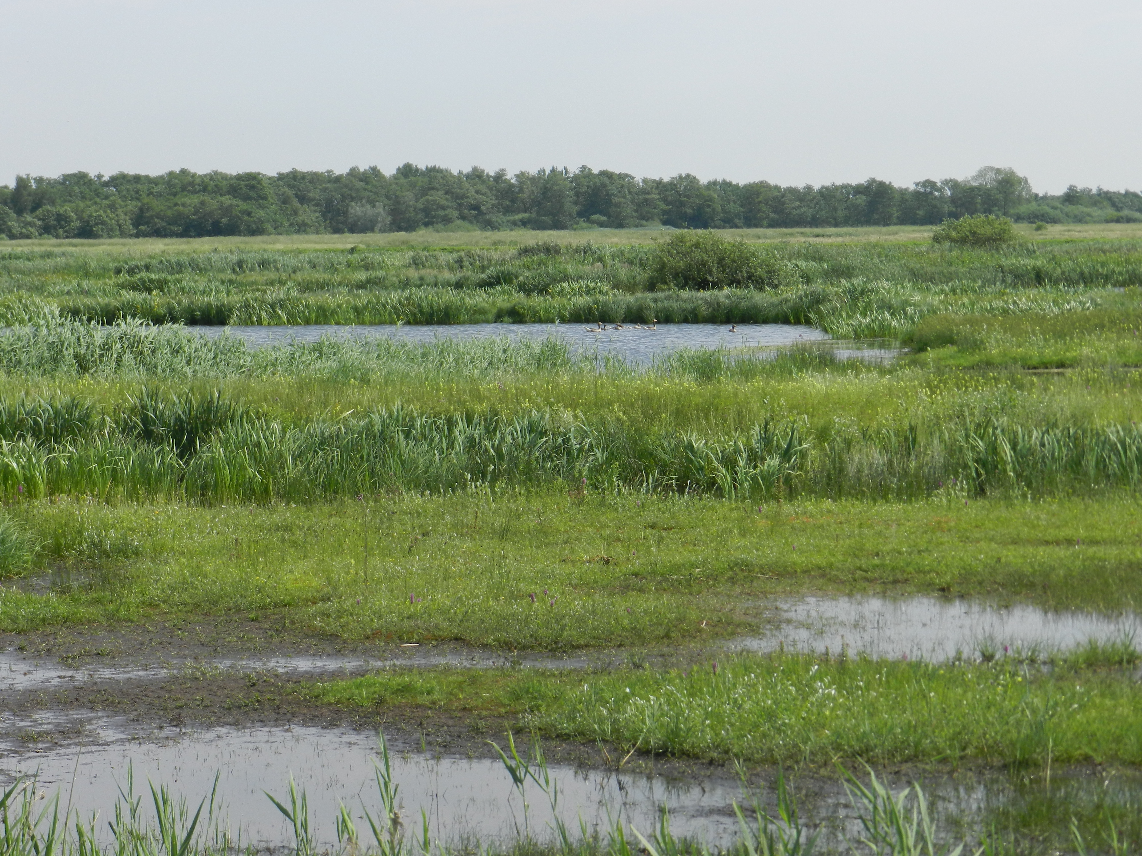 Tienhovenseplassen